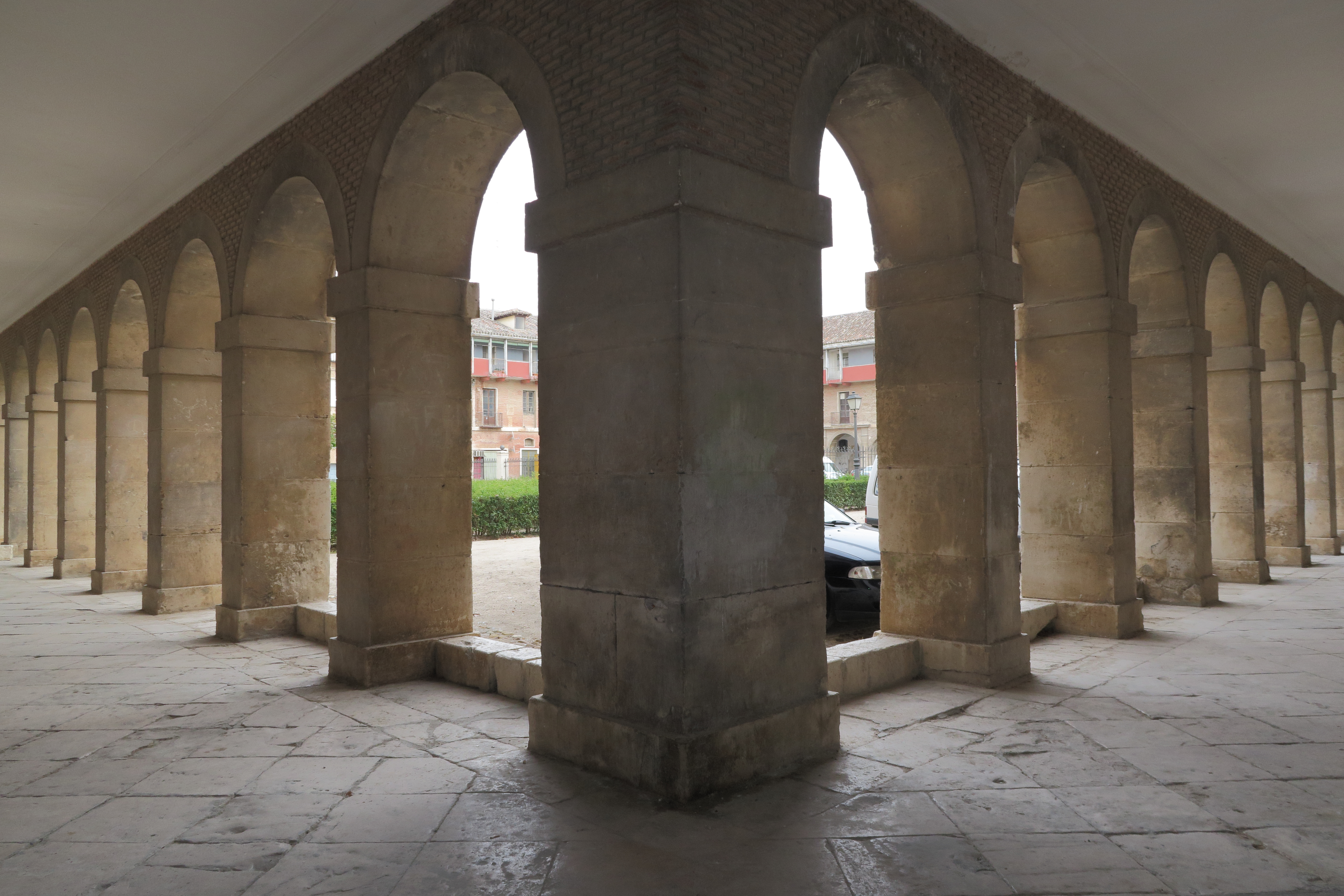 Casa de Infantes Arquería en el patio de la Casa de los Infantes